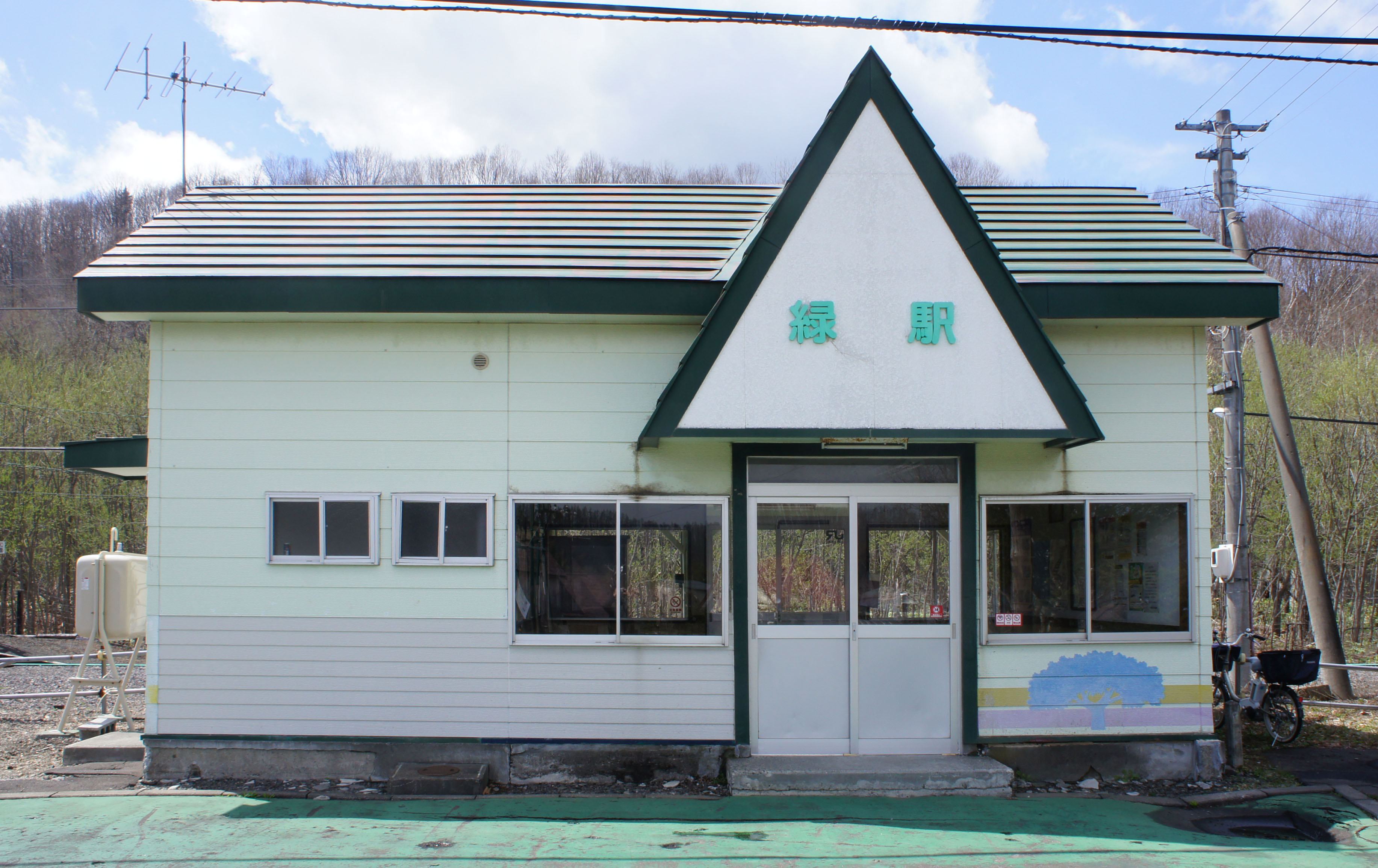 JR釧網本線・緑駅の駅舎